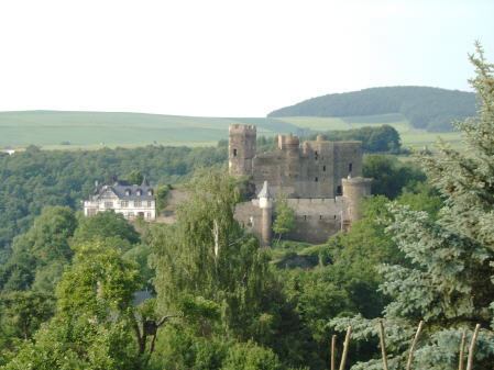 Burg Reichenberg im Rhein-Lahn-Kreis